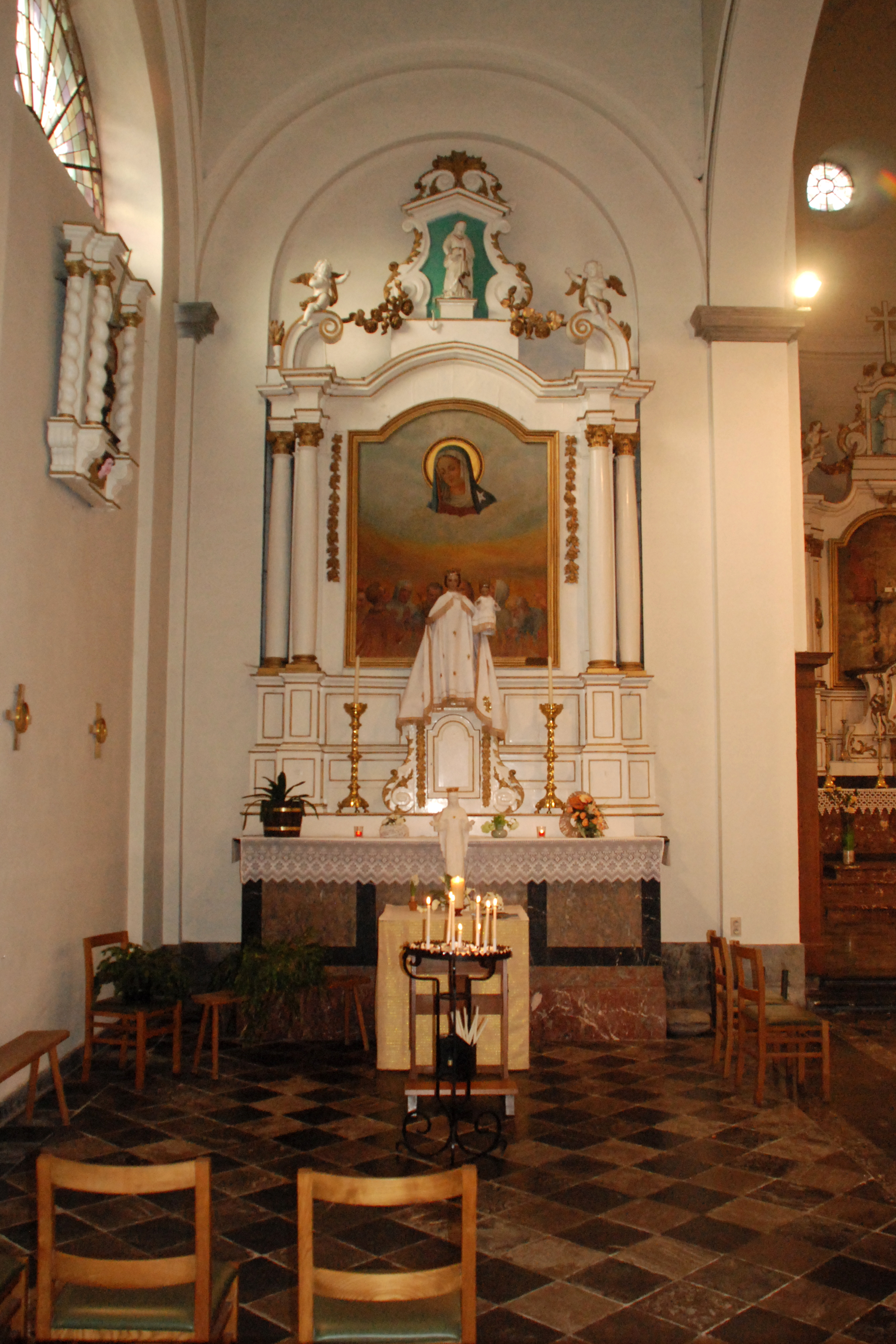 Belgique - Province de Namur - Viroinval - Nismes - église Saint-Lambert (1829)